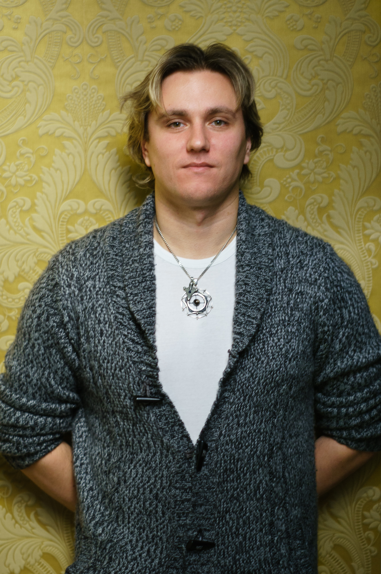 Tomasz Lazar, polski fotograf, laureat międzynarodowej nagrody "World Press Photo". Zdjęcie wykonane podczas warsztatów "Spotkanie z mistrzem" organizowanych przez FujiFilm, 18.11.2013.